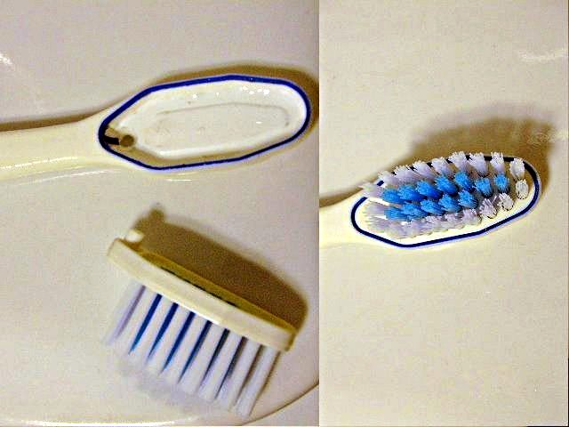 Bild einer Wechselkopfzahnbürste, mit und ohne Bürstenkopf. Minimal retuschiert (kleine Flecken). Selbst fotografiert. Picture of a toothbrush with exchange head. Made by myself.